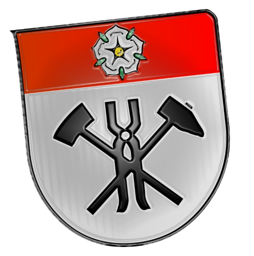 Wappen Wadgassen-Hostenbach